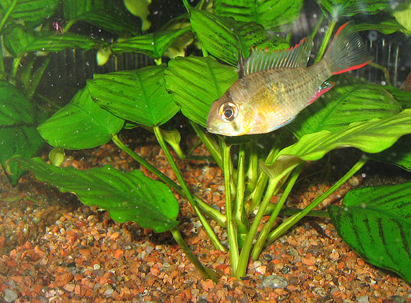 Bolivian Ram (Mikrogeophagus altispinosus)